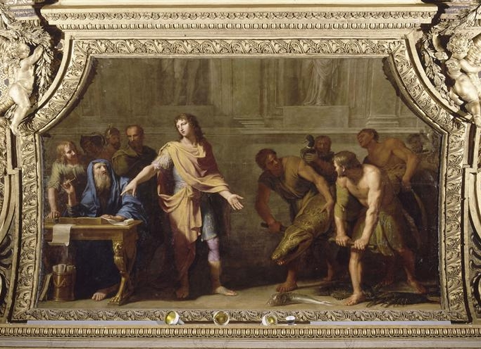 ALEXANDRE FAISANT APPORTER DES ANIMAUX ETRANGERS A ARISTOTE ; Salon : Salon de Mercure, Grands appartements du Château de Versailles Emplacement : voussure ; nord